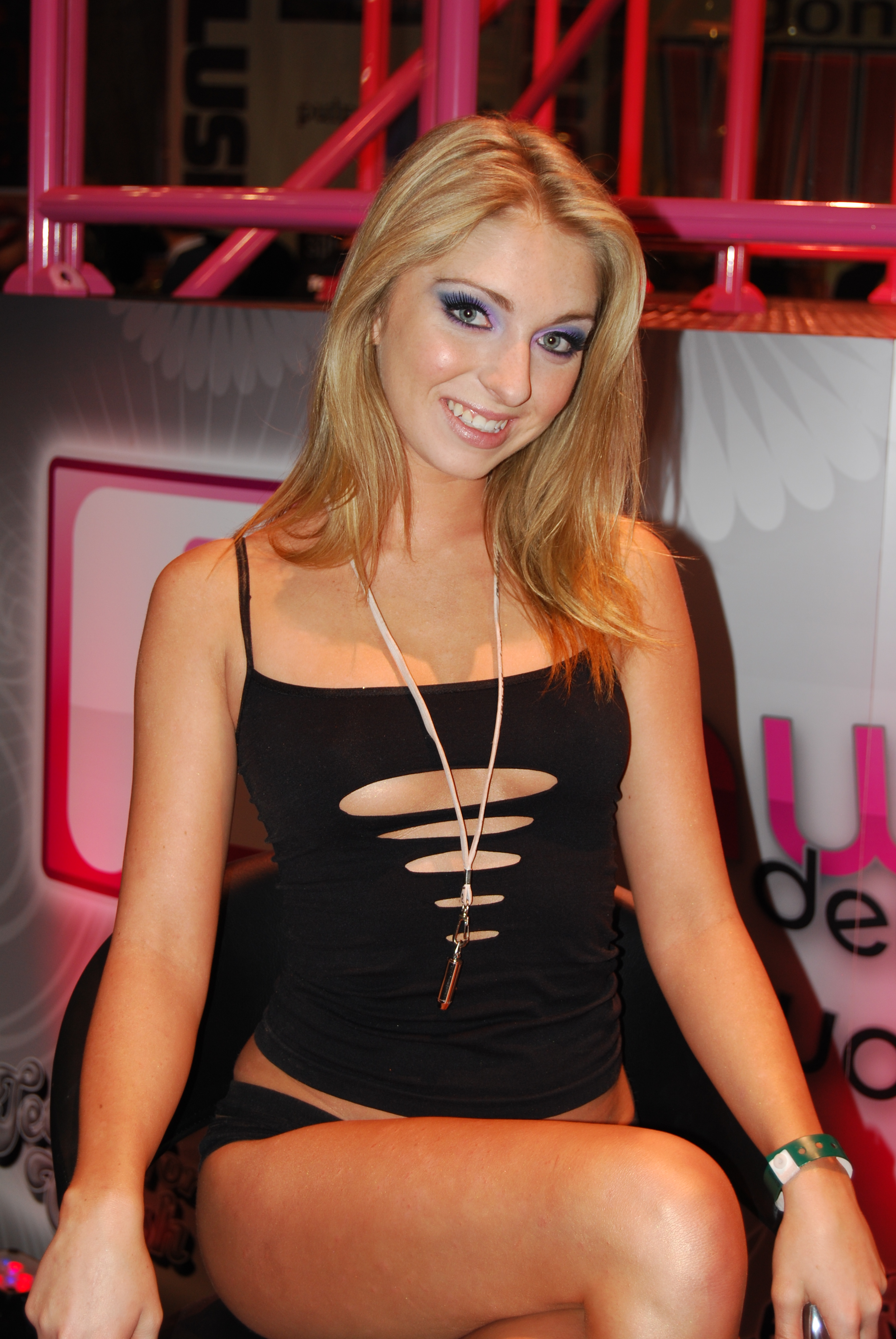 AEE2008_Nikon_Day2 056